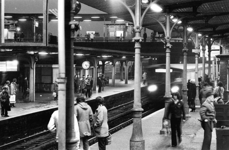 ADN-ZB-Zimmermann-4-12-81-hü-Berlin: S-Bahnhöfe- Den Bahnhof Ostkreuz durchfahren 94 Prozent aller Benutzer der Stadtbahn oder steigen hier um. Das Besondere an diesem Knotenpunkt ist die Konstruktion mit vier Bahnsteigen in zwei "Etagen". (siehe dazu auch die Fotos Z1204-16 u. 17N) Durchschnittlich benutzen 800000 Menschen täglich die S-Bahn. Auf der über 300 km langen Strecke gibt es mehr als 150 Bahnhöfe. Die S-Bahnzüge legen täglich rund 80000 km zurück."